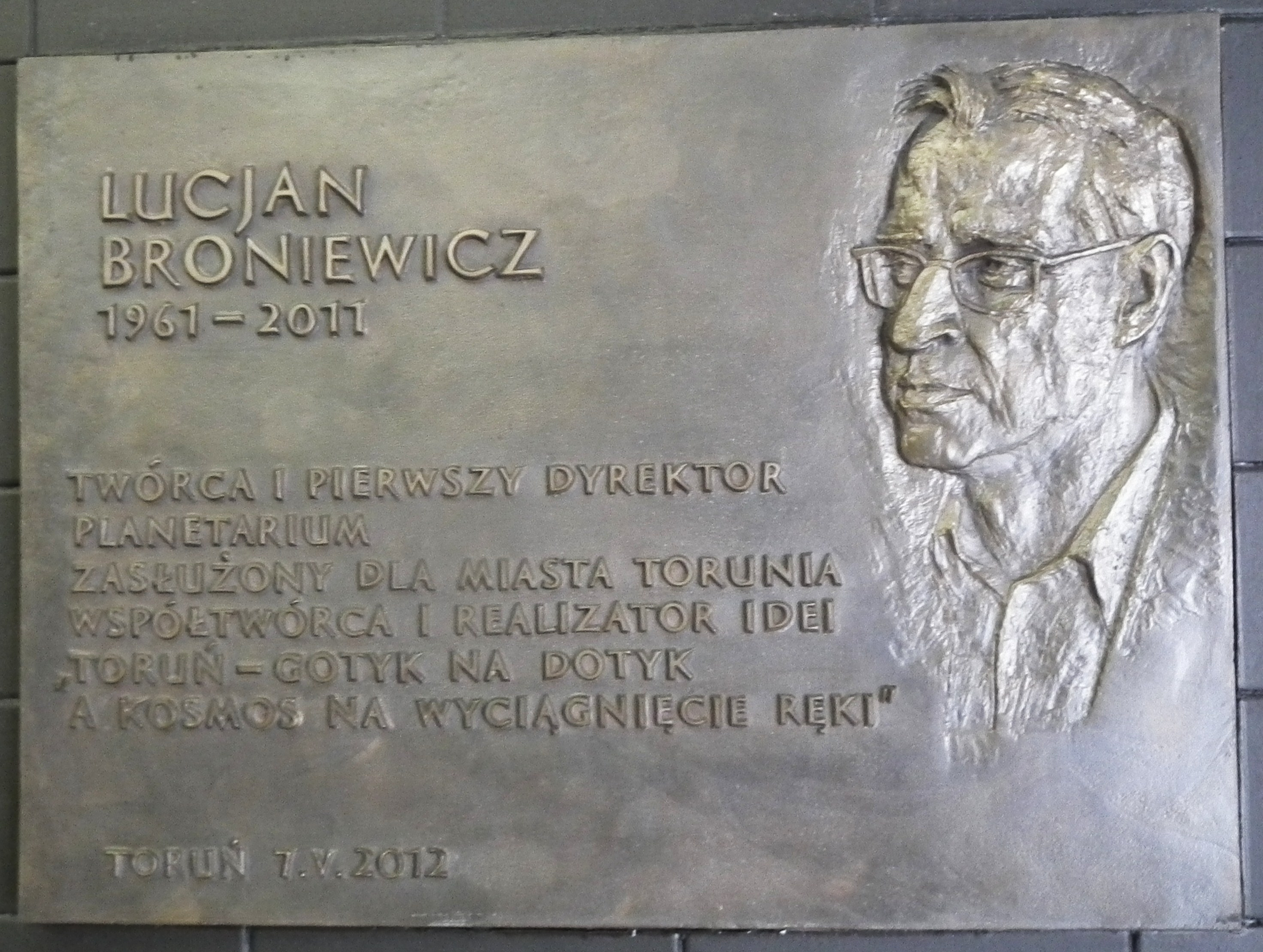 Płyta Lucjana Broniewicza w toruńskim planetarium.